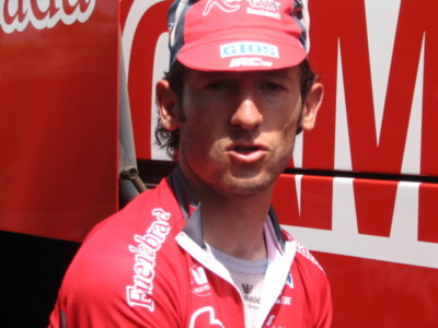 Angel Vallejo equipo Relax Fuenlabrada